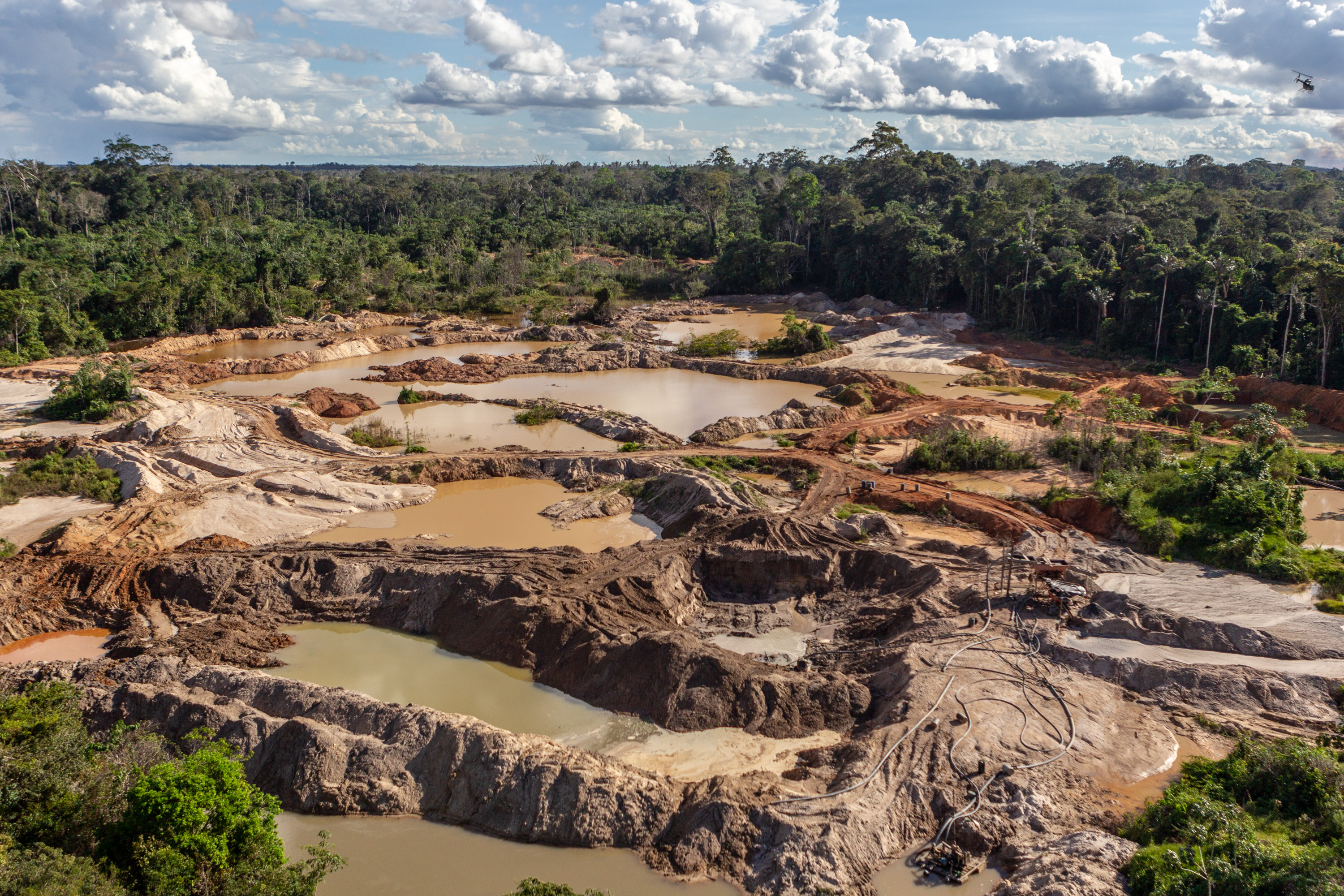 Grupo Especializado de Fiscalização (GEF) do Ibama combate desmatamento e garimpo de cassiterita na Terra Indígena Tenharim do Igarapé Preto, Amazonas Foto: Vinícius Mendonça/Ibama Mais informações